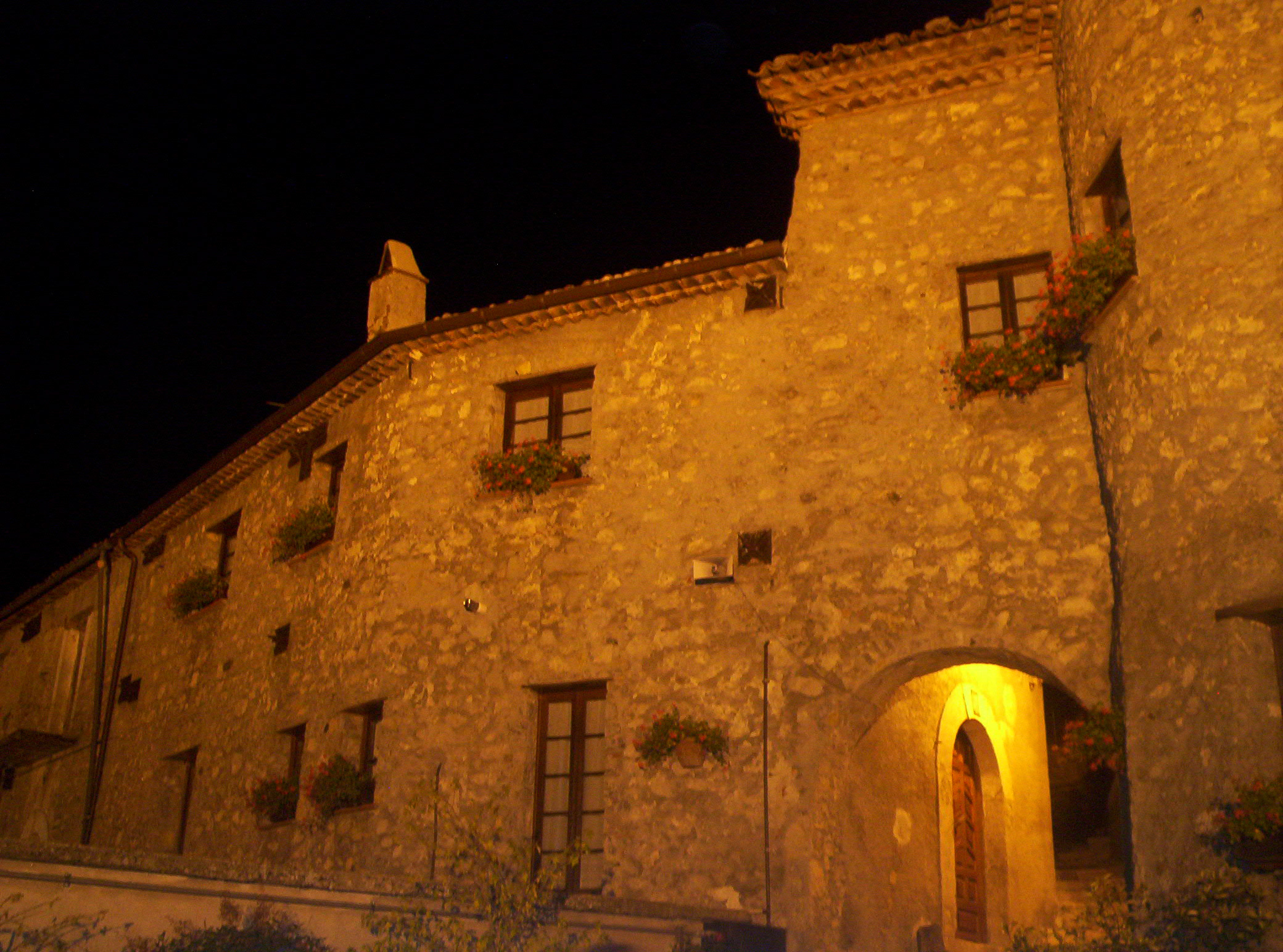 Foto notturna del castello di Marsicovetere.